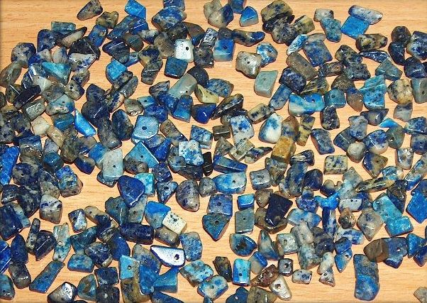 minerał; lapis lazuli; autor zdjęcia Grzegorz Framski 20.07.2006r.